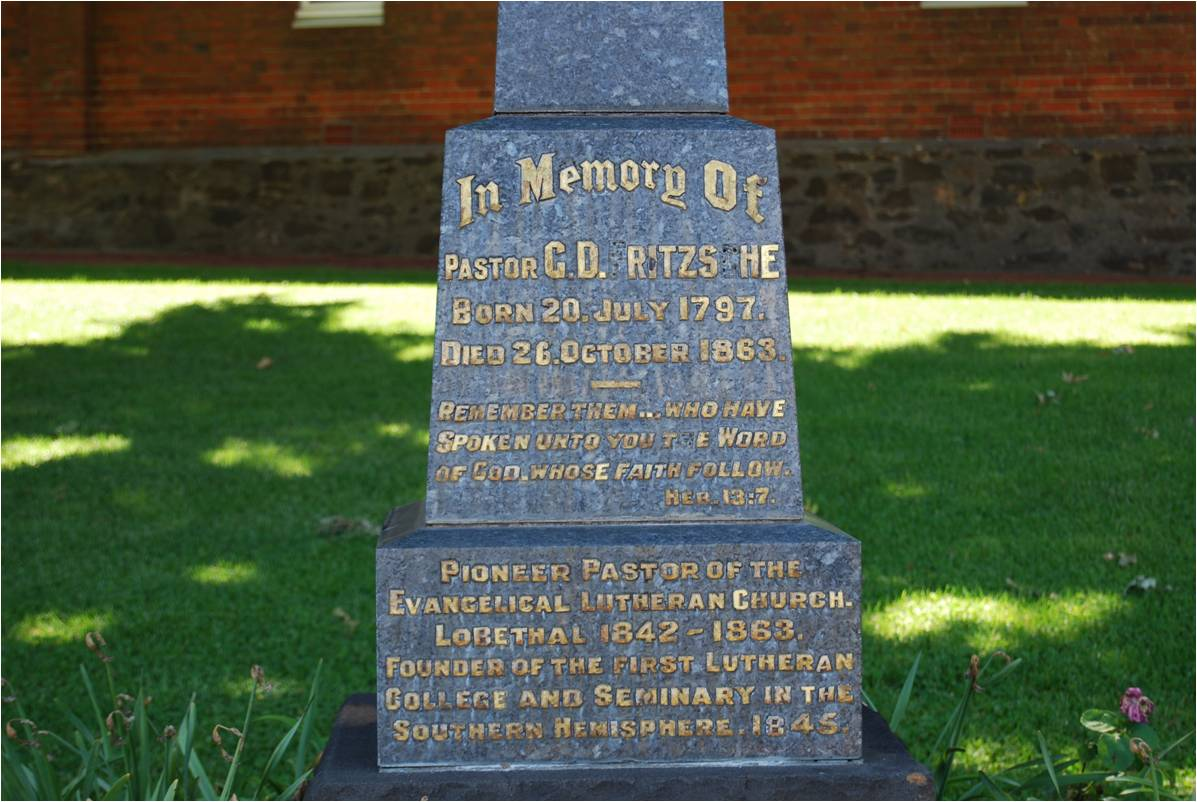 Gedenkstein zu Ehren von Pastor Gotthard Fritzsche in Lobethal